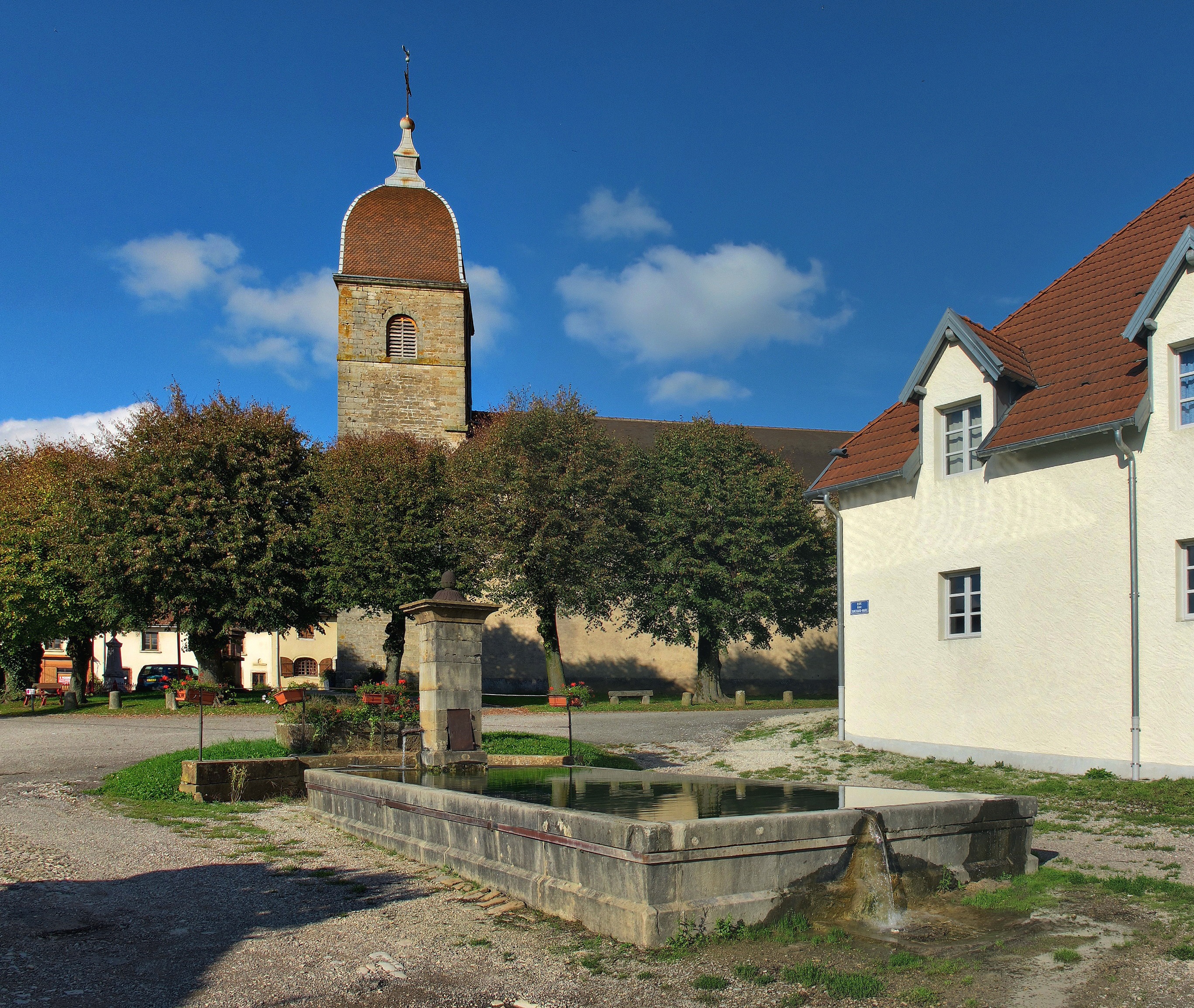 La fontaine et l'église.